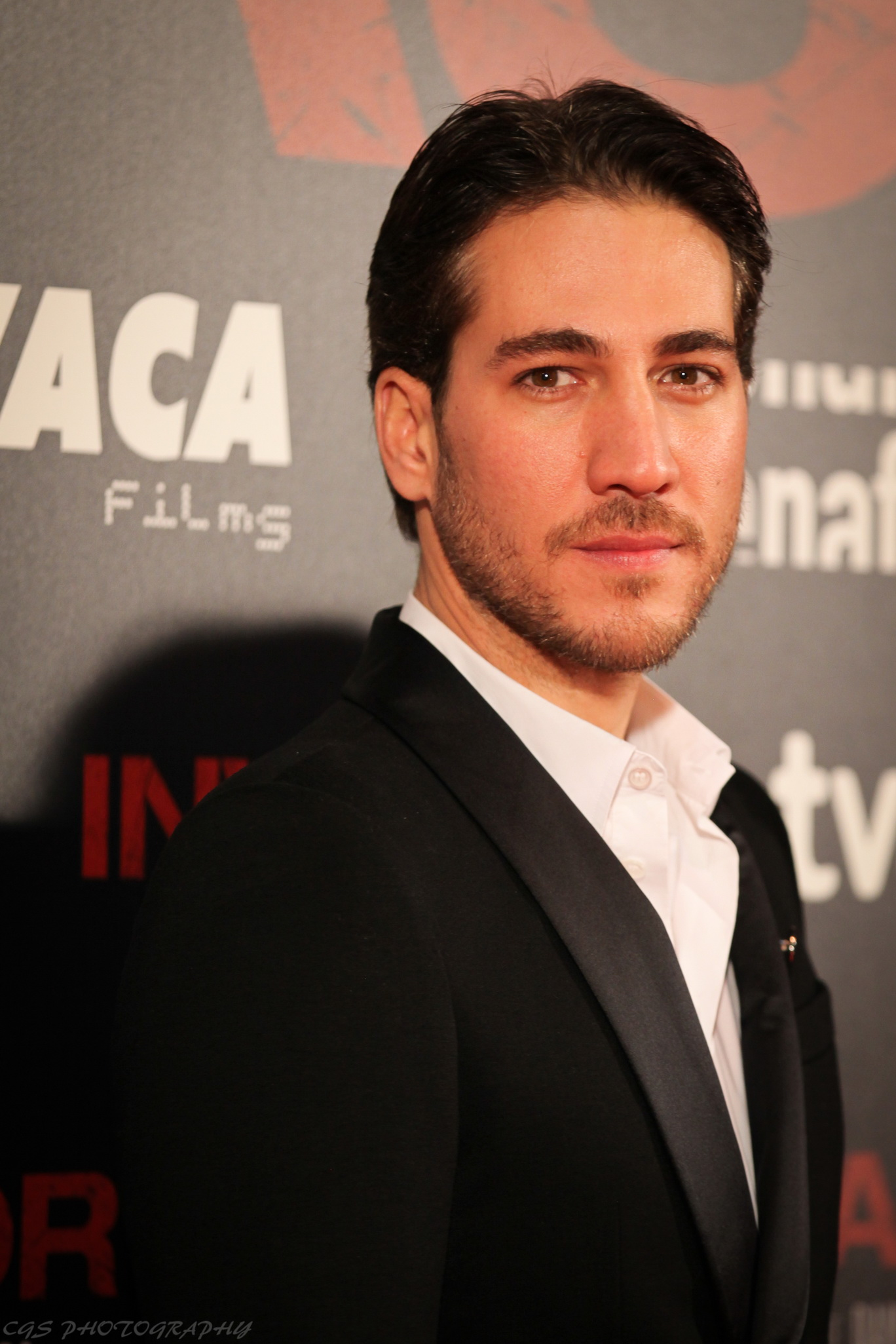 Película de Daniel Calparsoro protagonizada por Alberto Ammann, Antonio de la Torre, Inma Cuesta y Karra Elejalde.